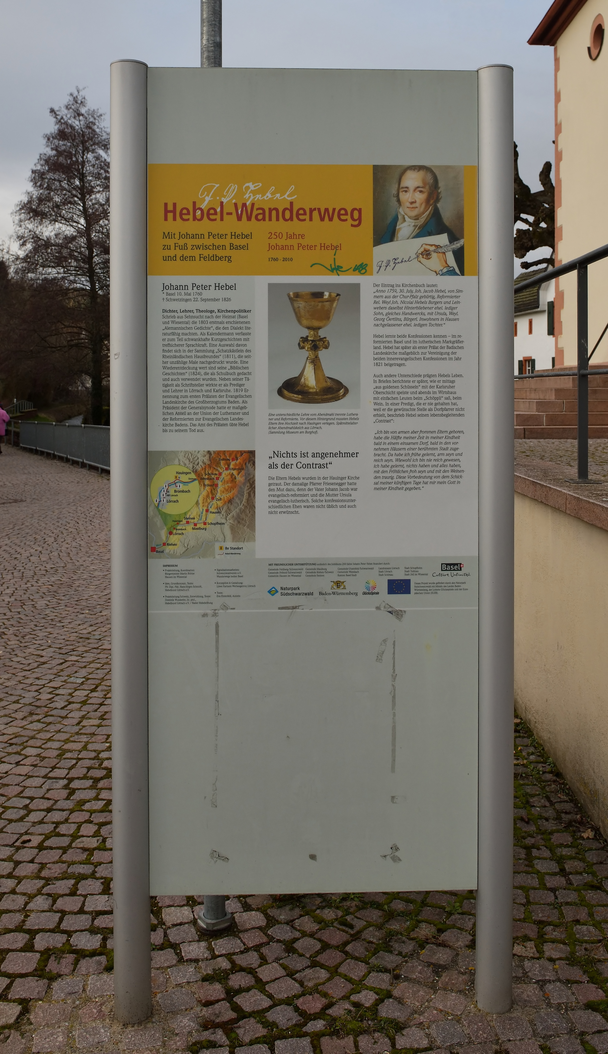 Info-Stele zum Hebelwanderweg an der Hauinger Kirche